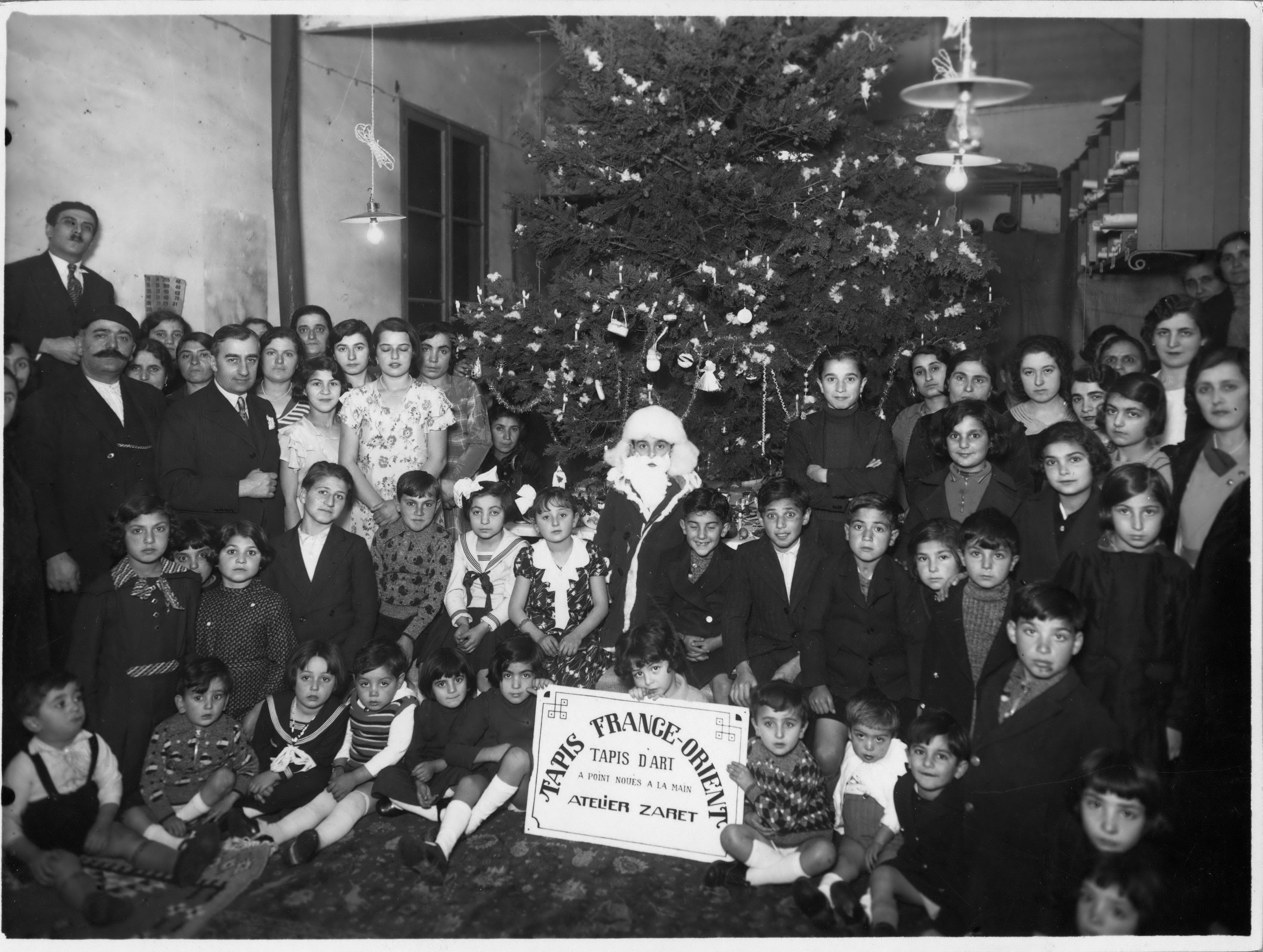 TFO Fête de Noël 1934. Coll. A. Tchouhadjian